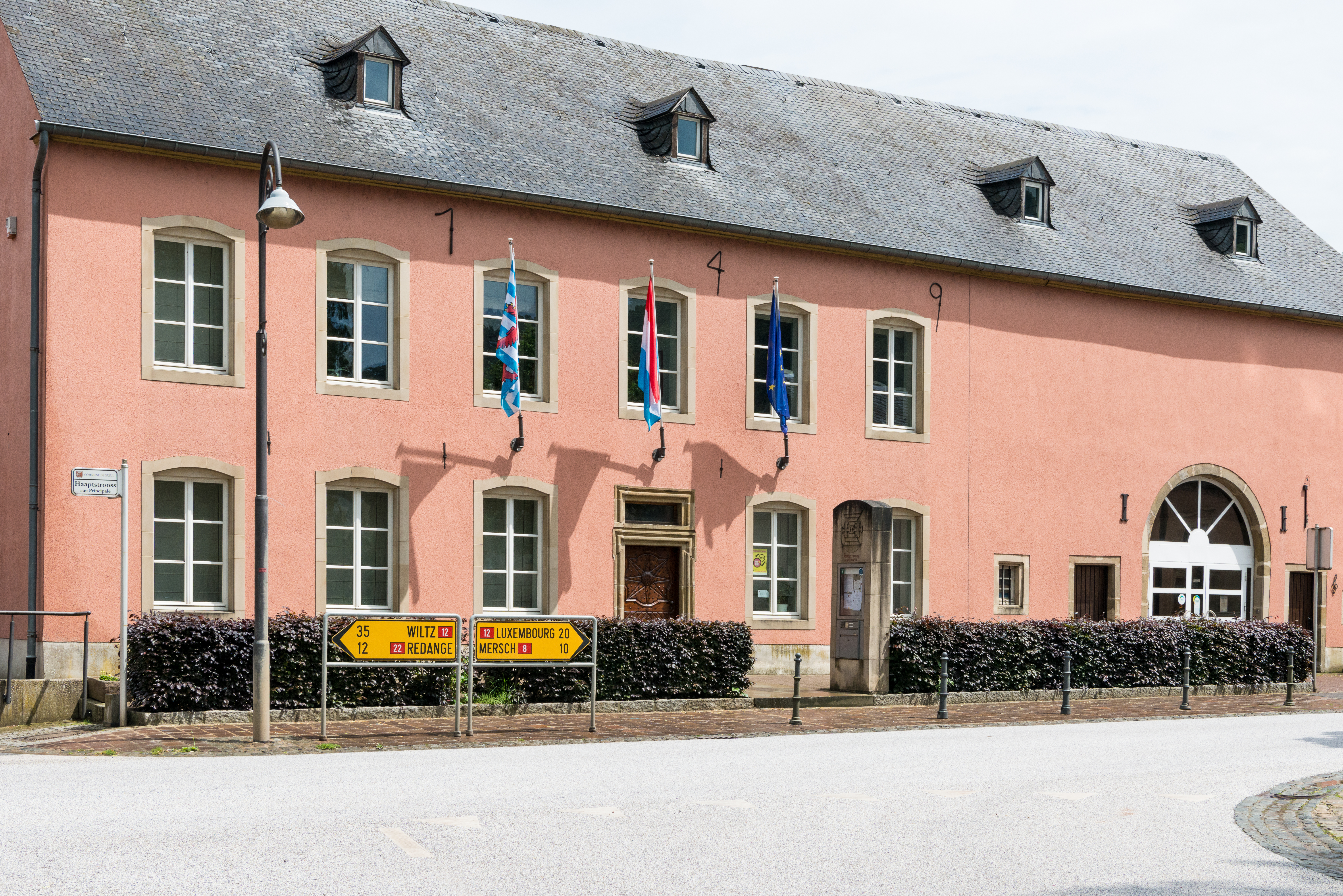 D'Märei zu Sëll un der Haaptstrooss.